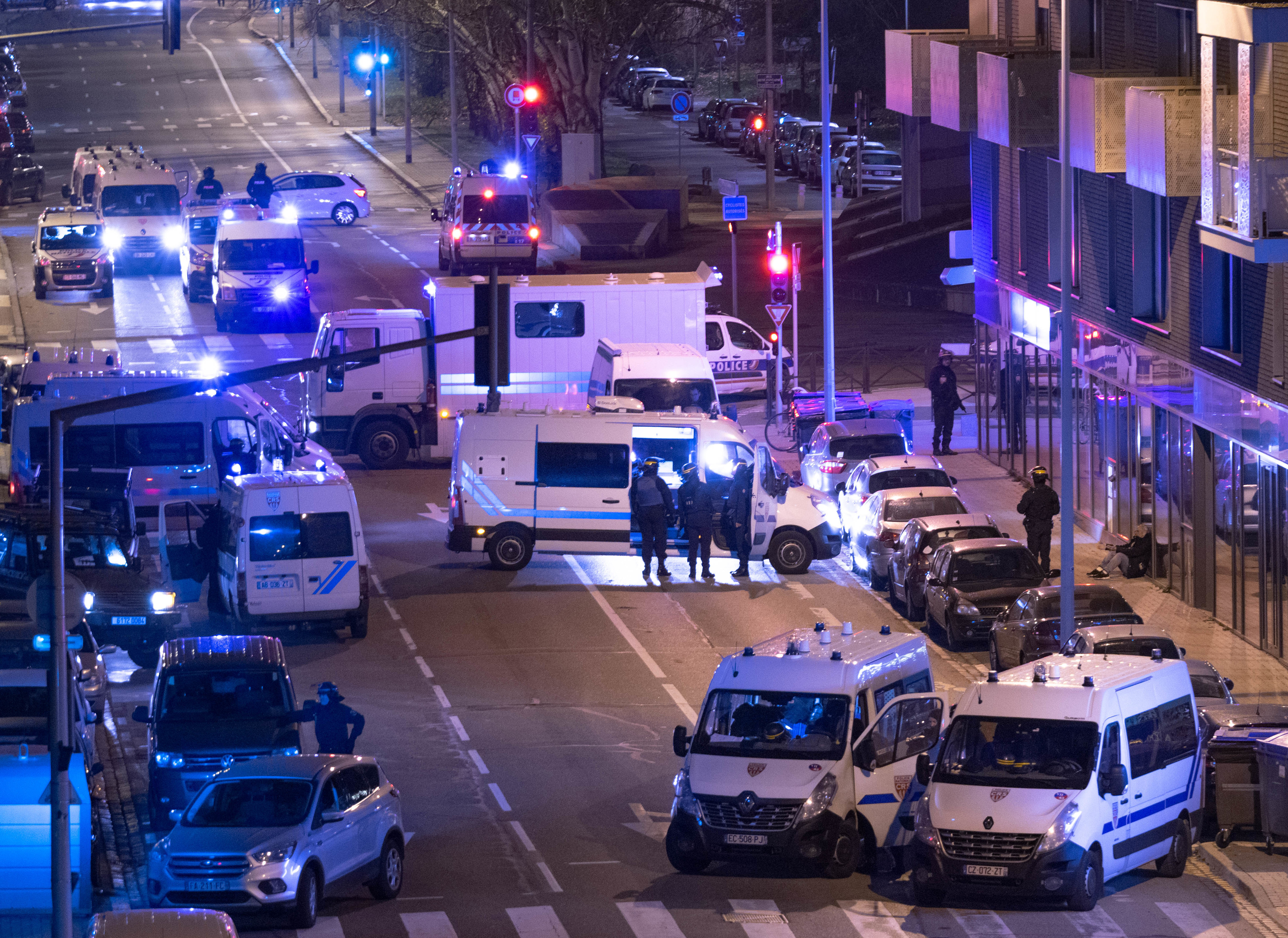 Intervention des services de police le soir de l'attentat à Strasbourg, 11 décembre 2018, route de l'hôpital.